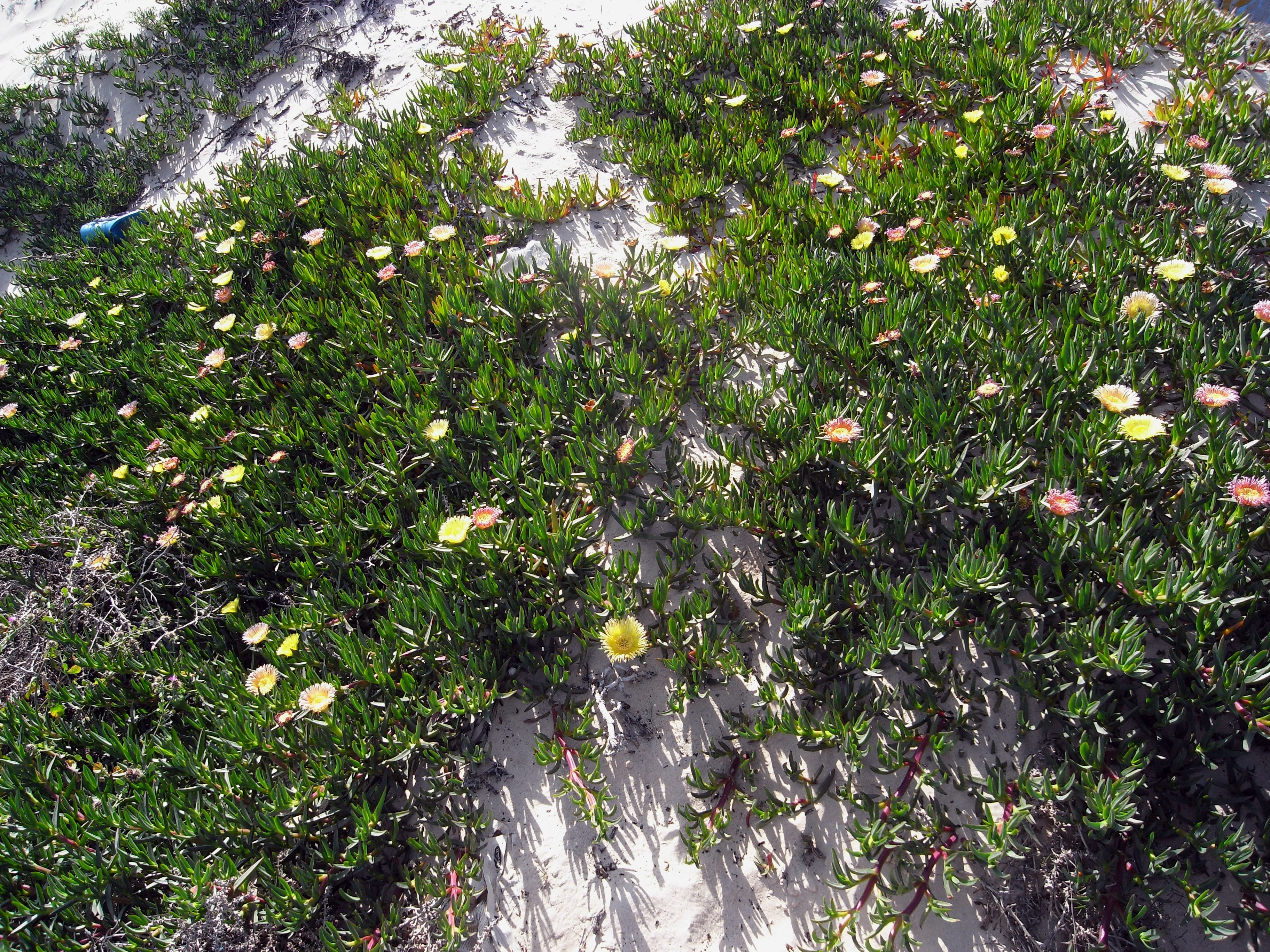 Carpobrotus edulis, Sousse, Tunesien, Ende April 2009